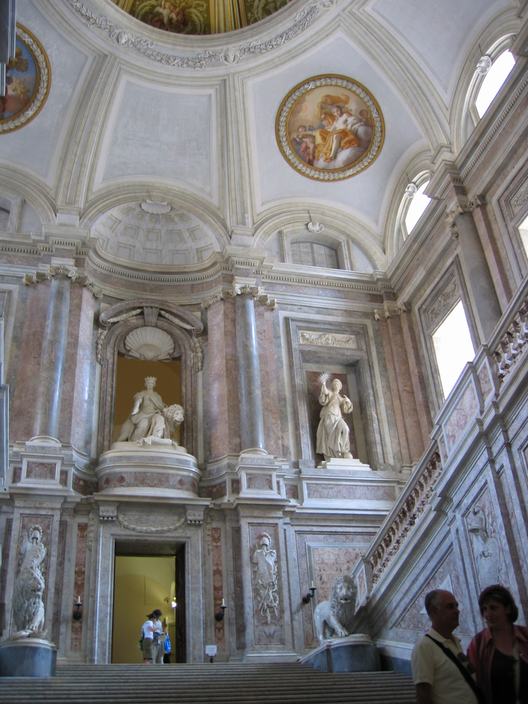 Großes Treppenhaus des Königspalasts von Caserta